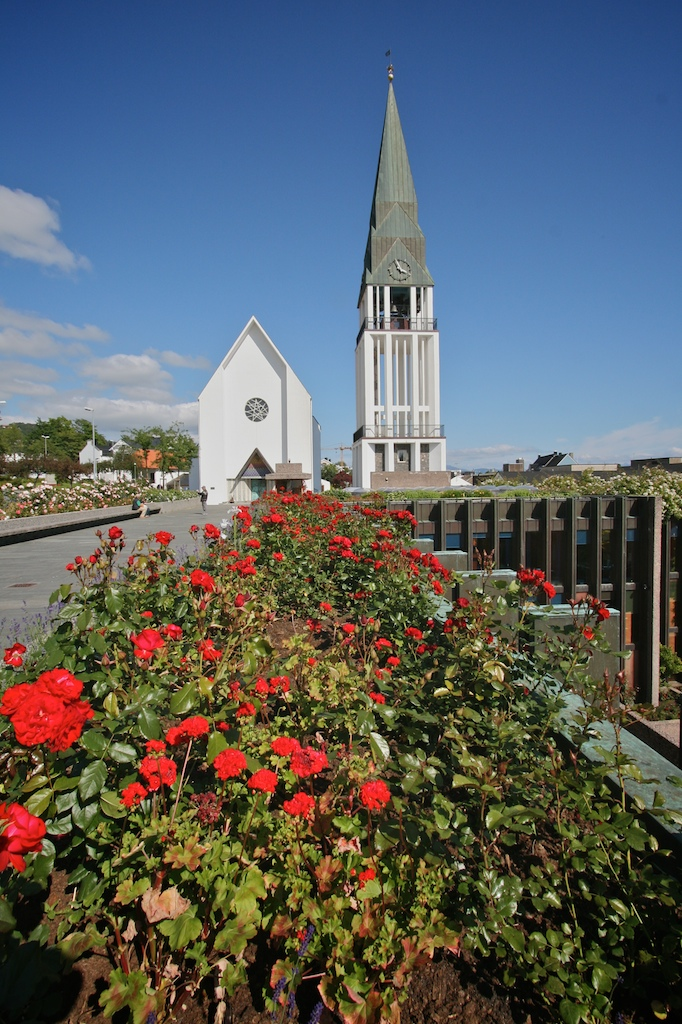 Molde domkyrkje